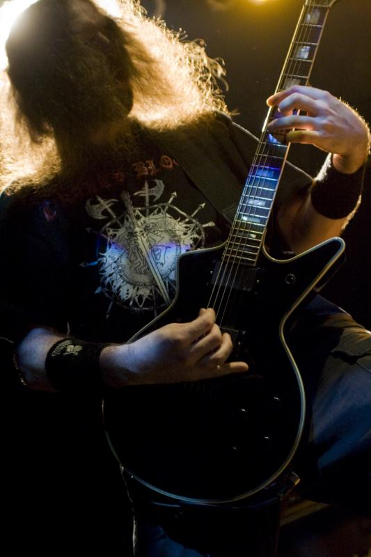 Rob Barrett of Cannibal Corpse Live @ Santana Hall - 21/02/2010 - São Paulo, Brasil É proibida a cópia ou reprodução deste material sem a autorização do autor. Por favor, não publique nada daqui sem o devido crédito. Fotógrafo: Alexandre Cardoso